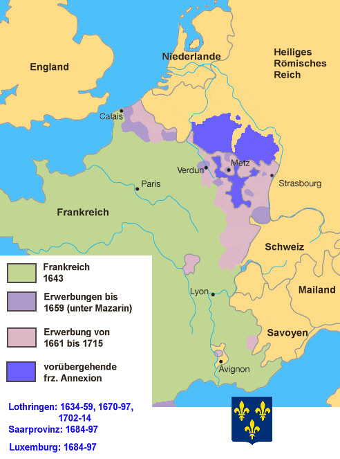 Frankreich unter Ludwig XIV., folgende frz. Gebiete sind nicht verzeichnet: Veurne (1668-1678, ausgetauscht) Courtrai (1668-1678, ausgetauscht) Ypern (1678-1713, ausgetauscht) Ath (1668-1678, ausgetauscht) Binche (1668-1678, ausgetauscht) Charleroi (1668-1678, ausgetauscht) Landau in der Pfalz (1648) Philippsburg (1648-1679, 1688-1697) Kehl (1680-1697) Breisach am Rhein (1648-1697, 1703-1714) Freiburg im Breisgau (1679-1697, 1713-1714) Casale Monferrato (1681-1695)